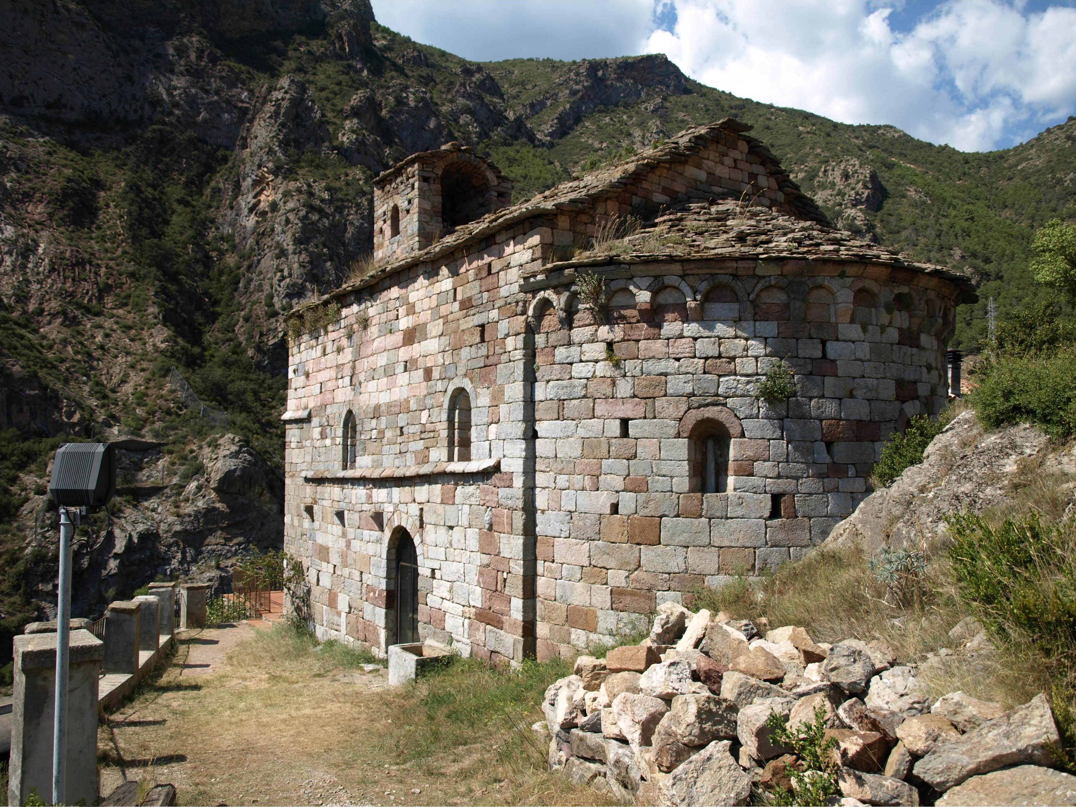 Santuari de la Mare de Déu d'Arboló (Soriguera)